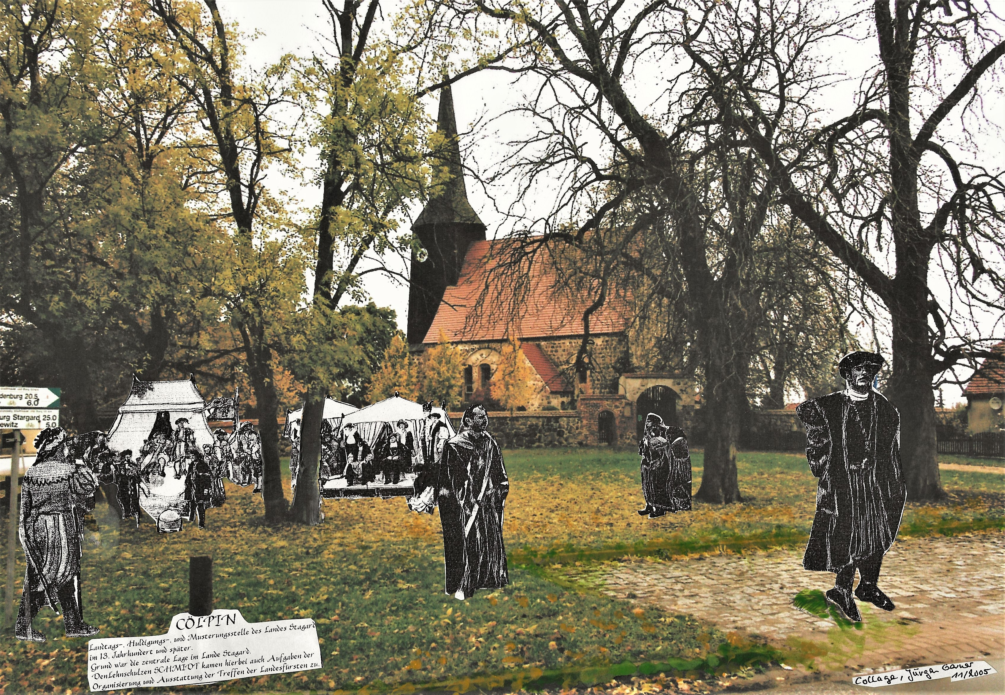 Nachgestellter Landtag im 16. Jahrhundert in Cölpin, Collage von Jürgen Gerner